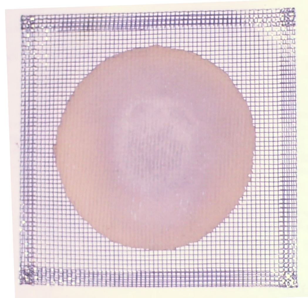 Keramikdrahtnetz